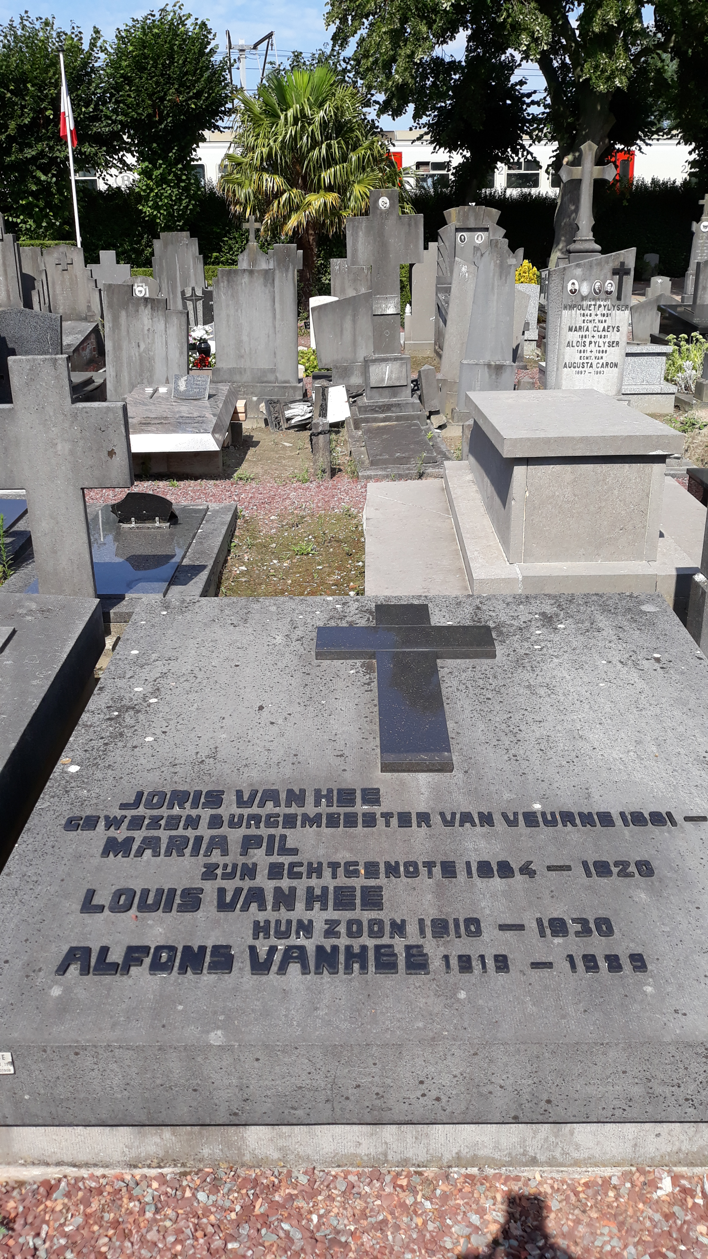 Das Grab des belgischen Kommunalpolitikers (Bürgermeister Veurne) Joris van Hee und seiner Ehefrau Maria Pil sowie Söhne Louis und Alfons auf dem Friedhof von Veurne (West-Vlaanderen, Belgien).